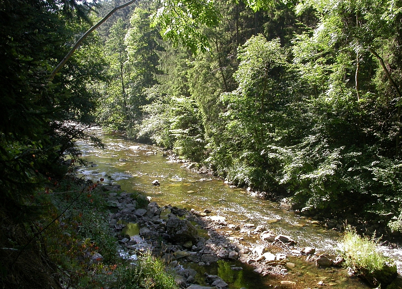 Wutachschlucht, Schwarzwald, Deutschland, Germany